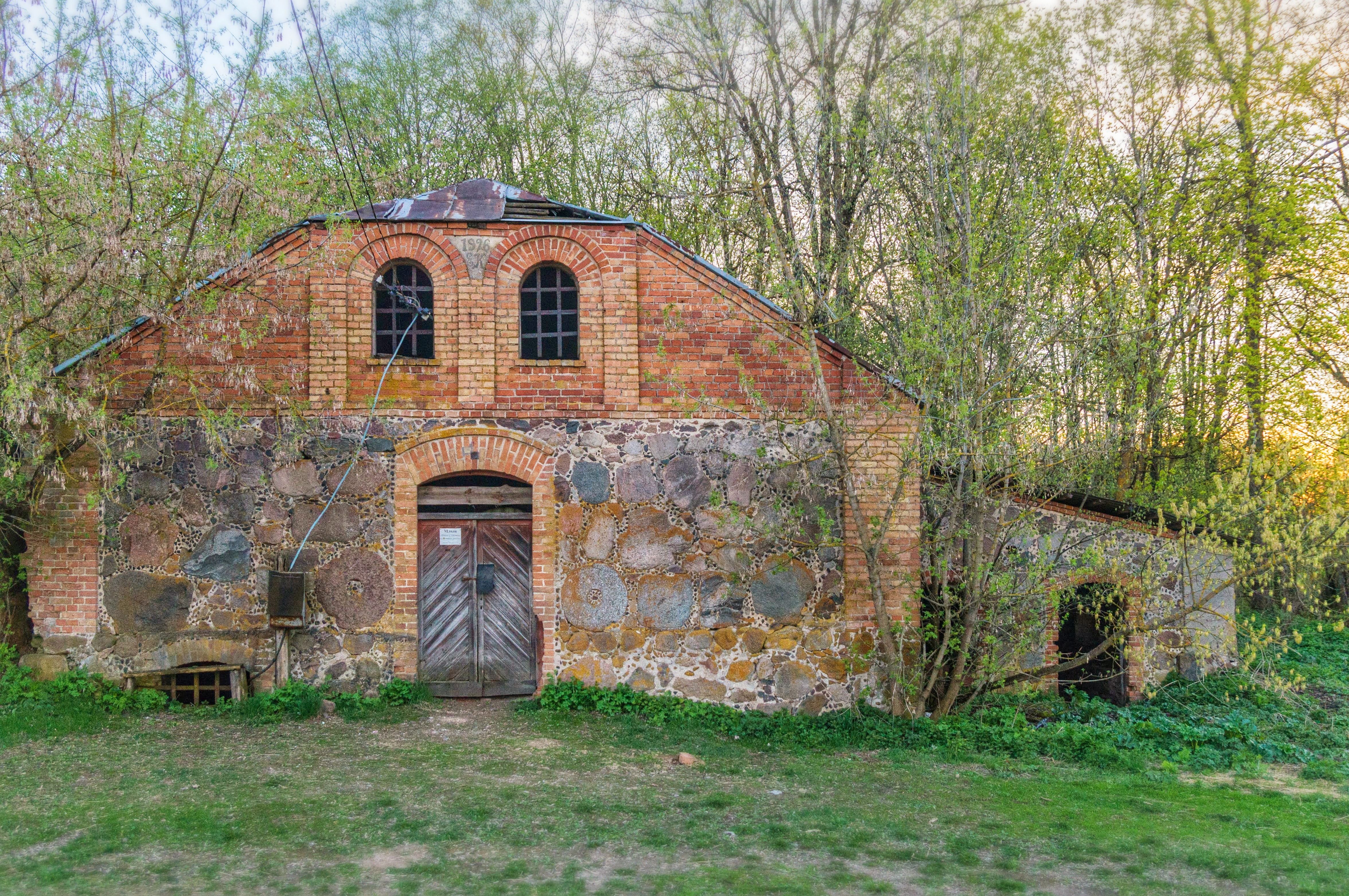 Лыцавічы. Паравы млын 1926 года